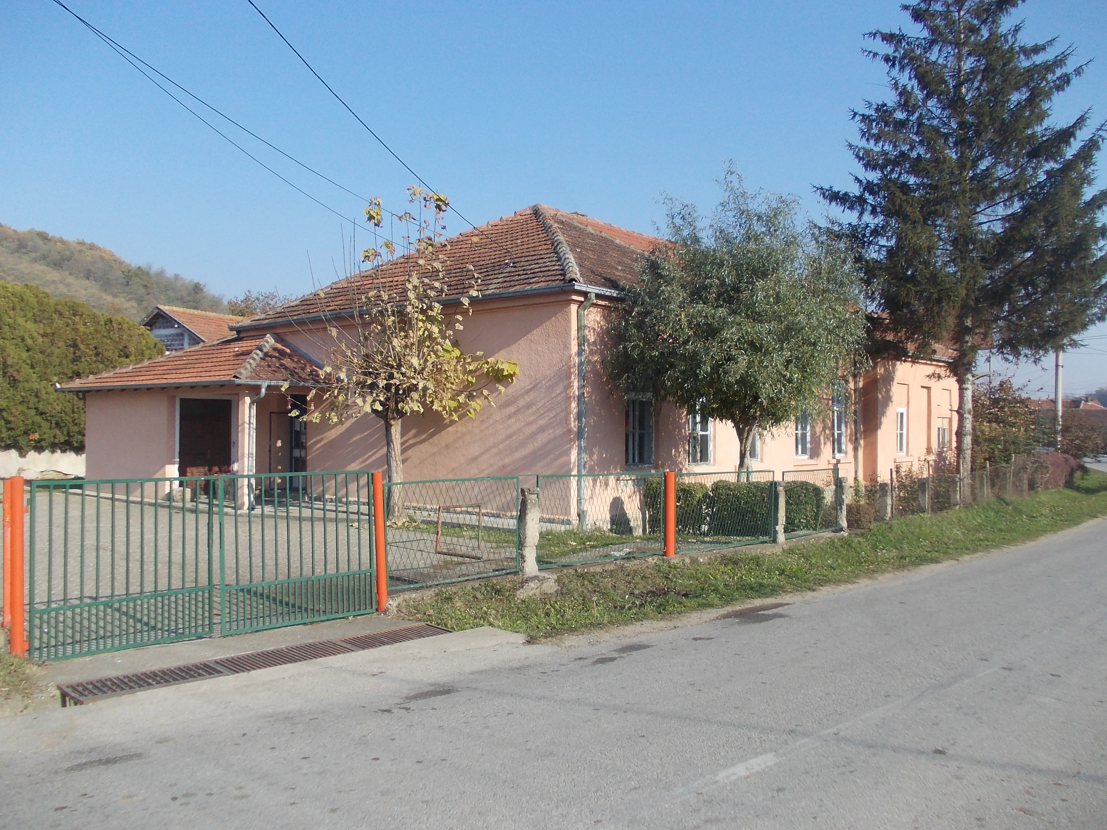 OŠ "Radislav Nikčević" u Glavincima